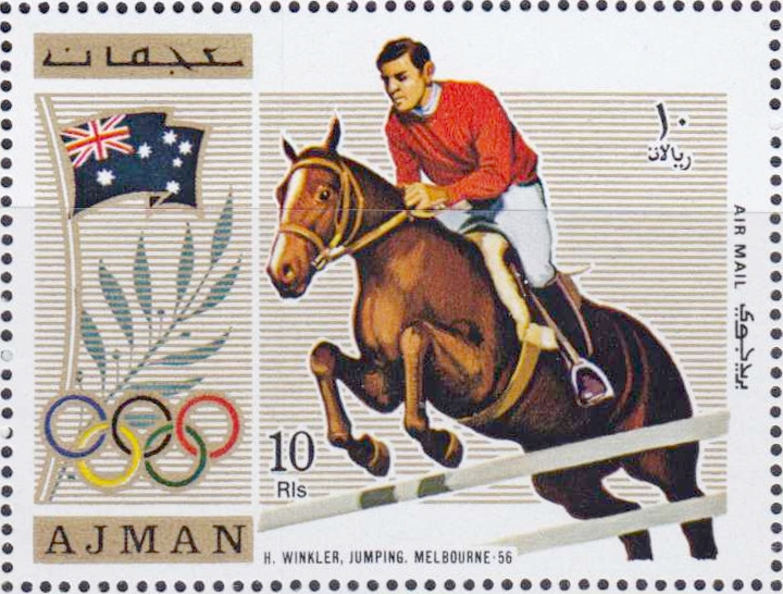 Hans Günter Winkler